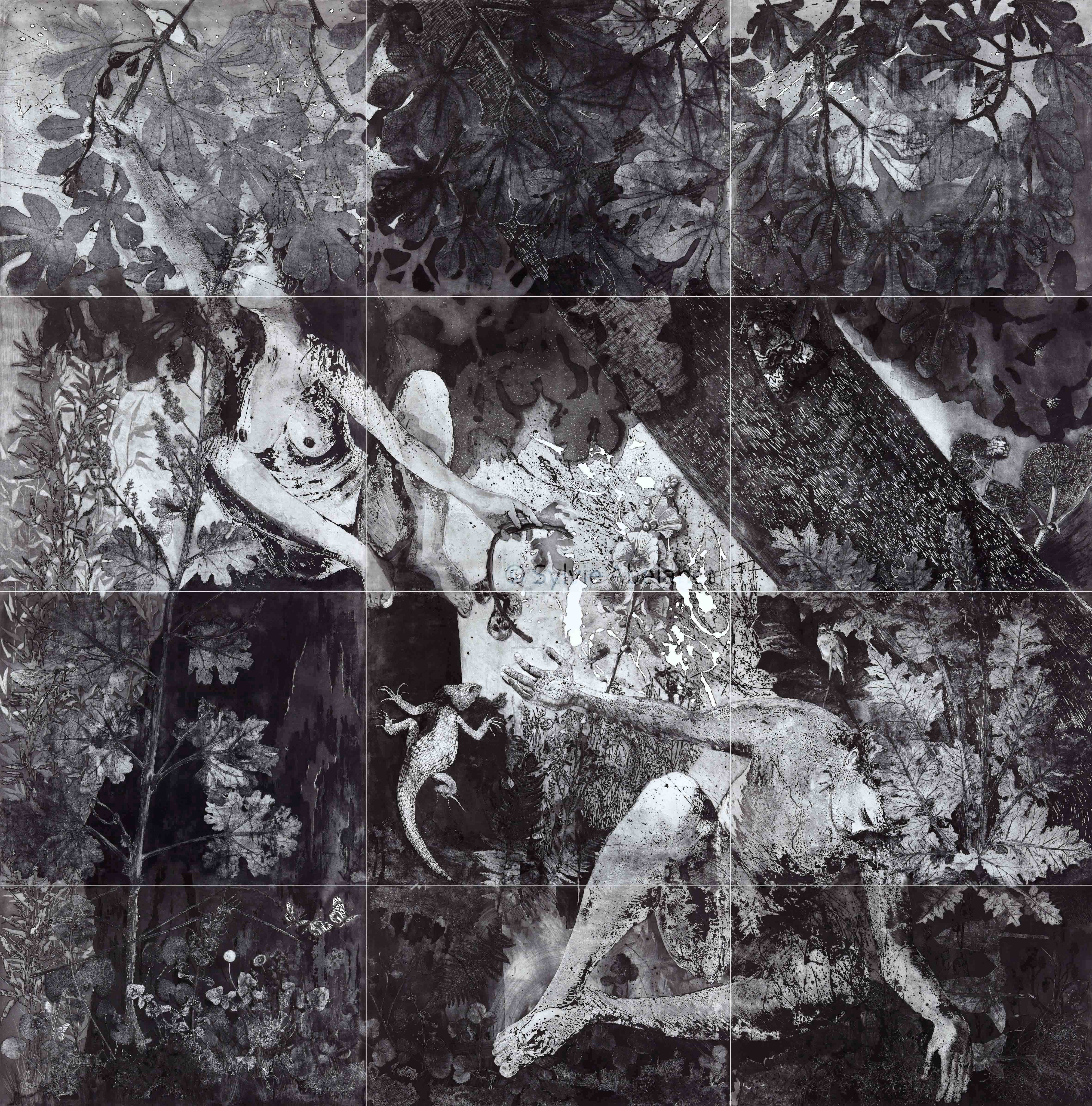 Titre : Le Paradis en Morceaux Technique : Estampe, eau-forte, aquatinte, vernis mou Taille : 3m x 3m en douze morceaux Support : zinc